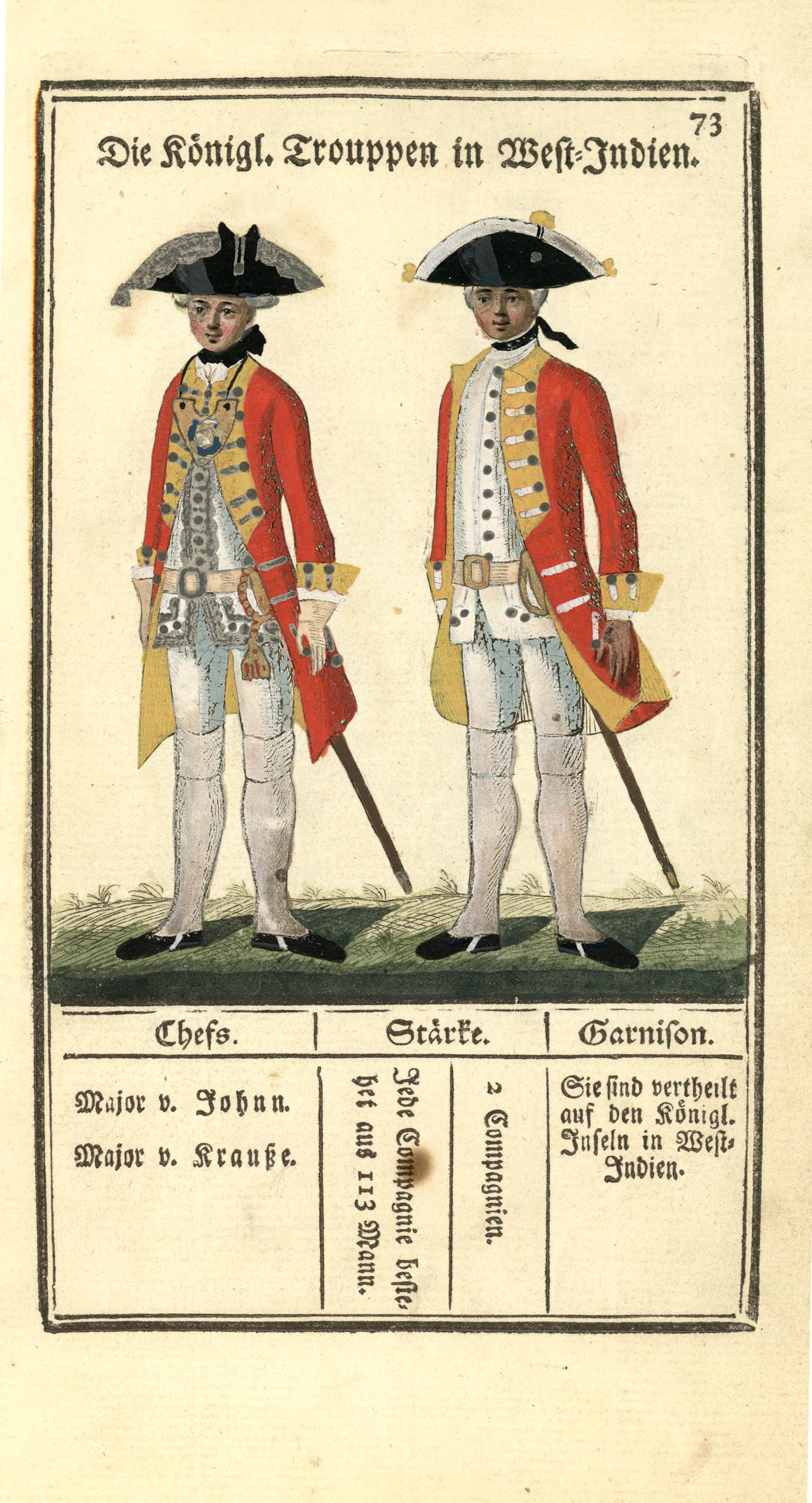 Illustrasjon hentet fra boken "Vorstellung der sämtlichen Königl. Dänischen Armee" av Bertram, Carl og utgitt av Carl Bertram (dk, 1763)